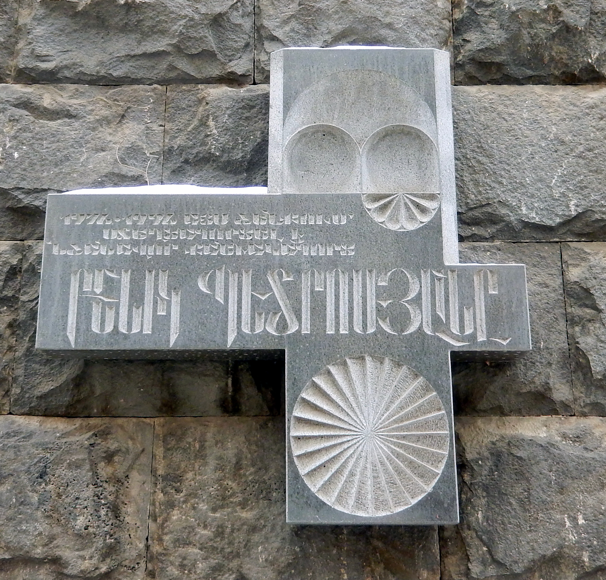 1976-1996 այս շենքում ստեղծագործել է նշանավոր քանդակագործ Բենիկ Պետրոսյանը, Հեղինակ` քանդակագործ Լևոն Իգիթյան